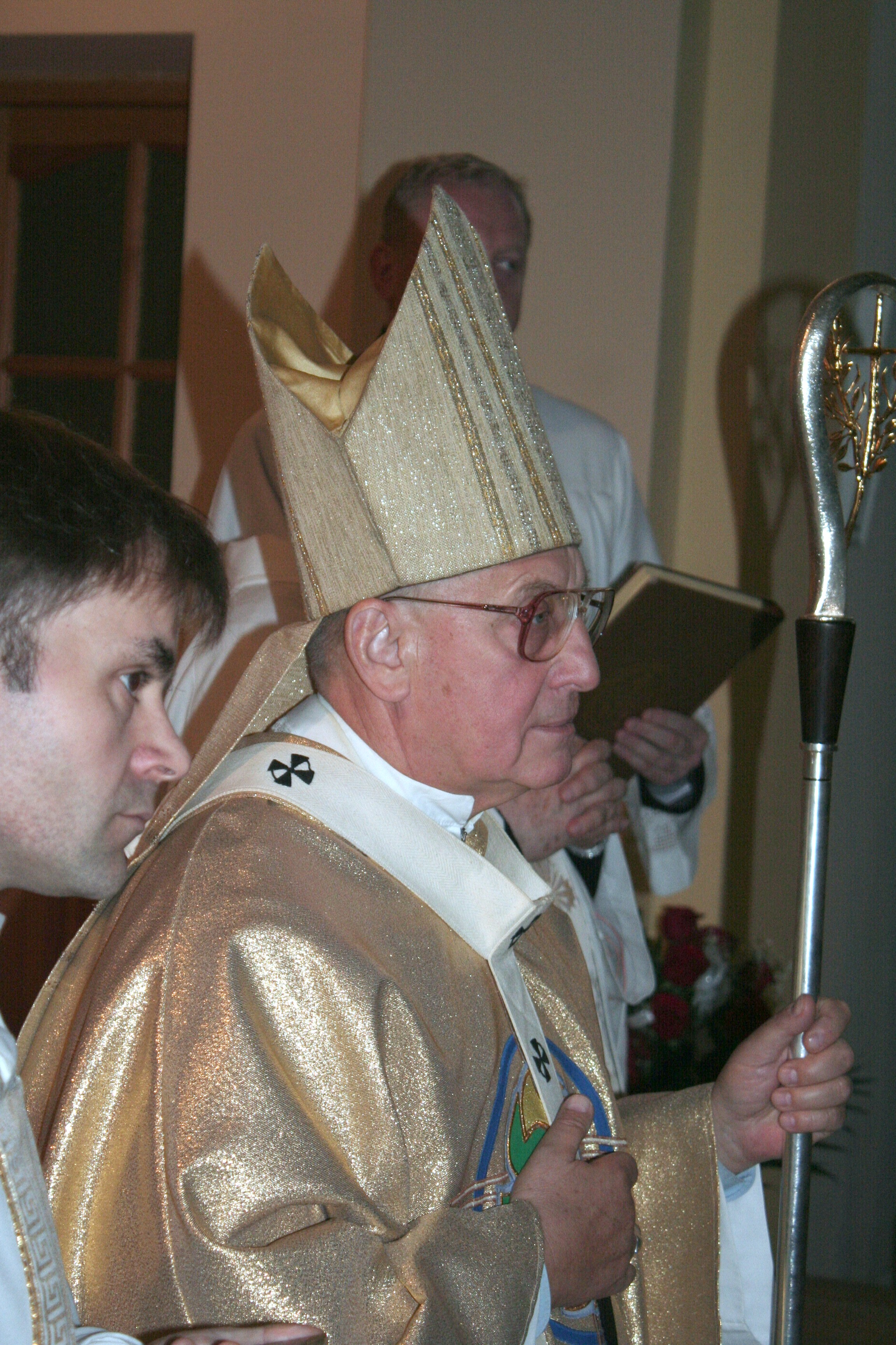 Беларуская (тарашкевіца): Тадэвуш Кандрусевіч, каталіцкі арцыбіскуп Мітрапаліт Менска-Магілёўскі пад час імшы ў Баранавічах.